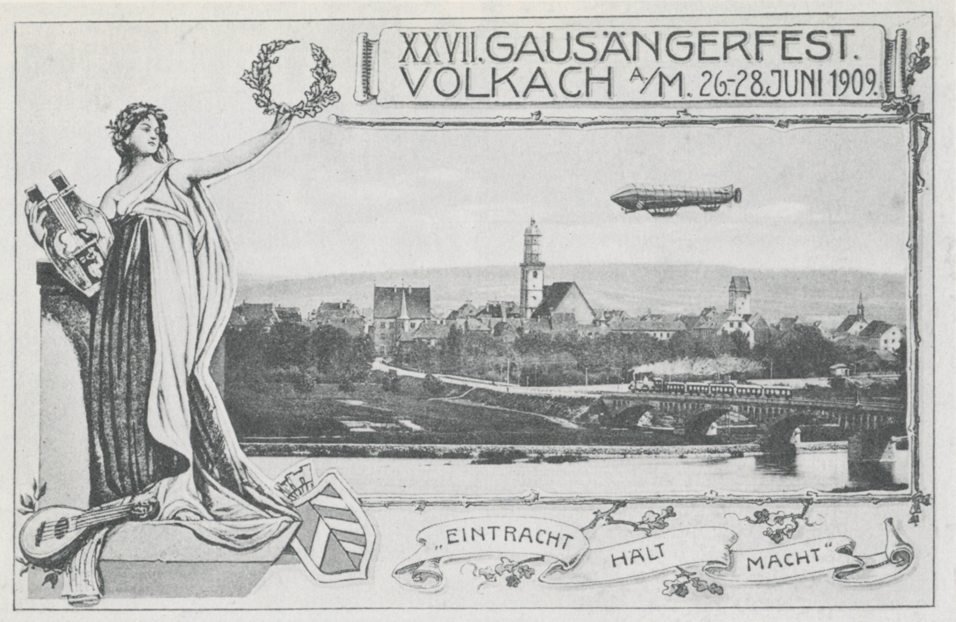 Postkarte XXVII. Gausängerfest in Volkach am Main 1909. Beschriftung: "XXVII. GAUSÄNGERFEST. VOLKACH a./M. 26.-28. Juni 1909." und Schriftband: "EINTRACHT HÄLT MACHT". Darstellung Eisenbahn auf Mainbrücke, Zeppelin.